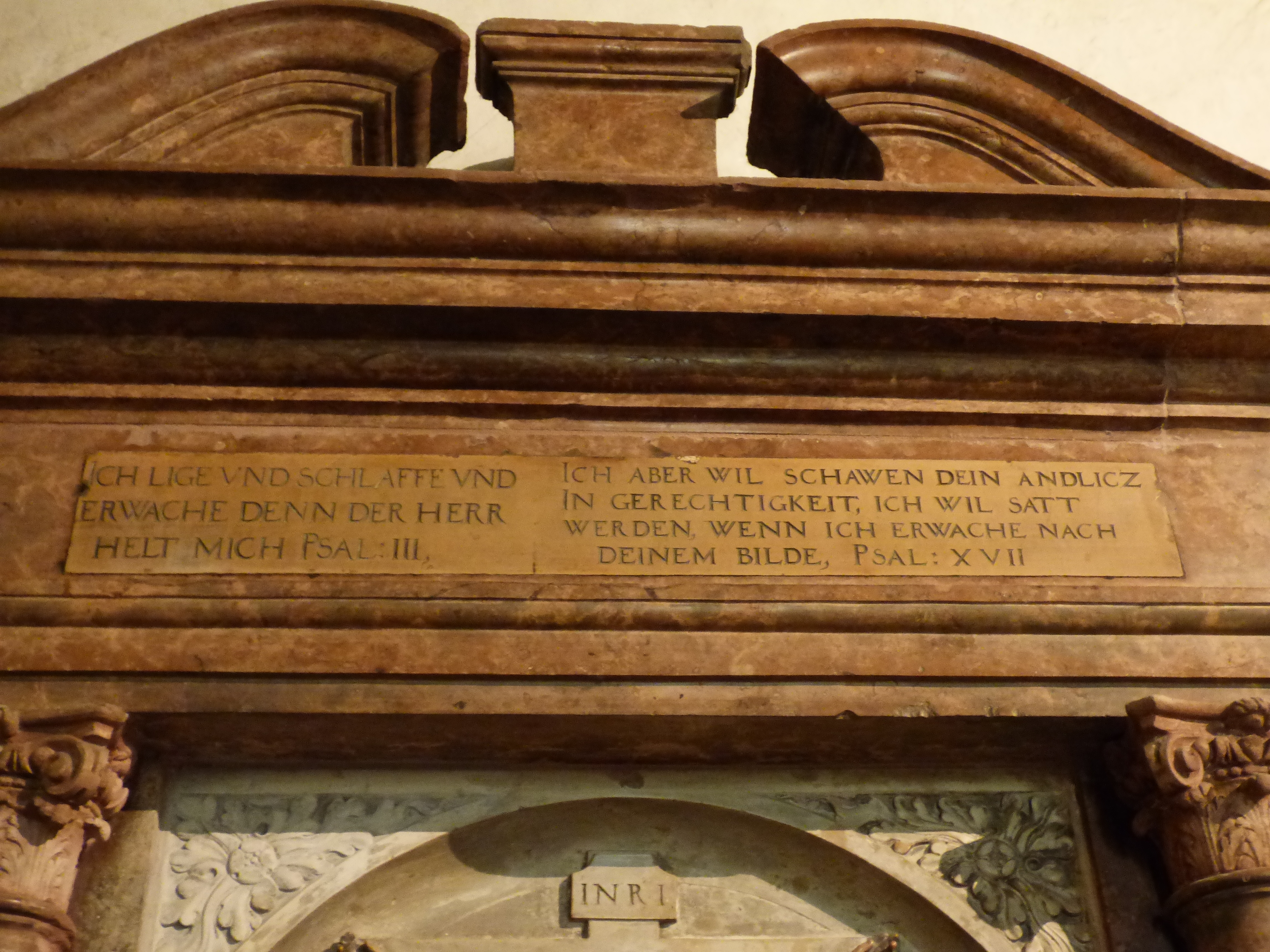 Michaelerkirche, Wien: Berchtold-Epitaph mit Texten aus Psalm 3 und Psalm 17 Ich lige vnd schlaffe vnd erwache denn der herr helt mich Psal:III Ich aber wil schawen dein andlicz in der gerechtigkeit, ich wil satt werden, wenn ich erwache nach deinem bilde, Psal: XVII